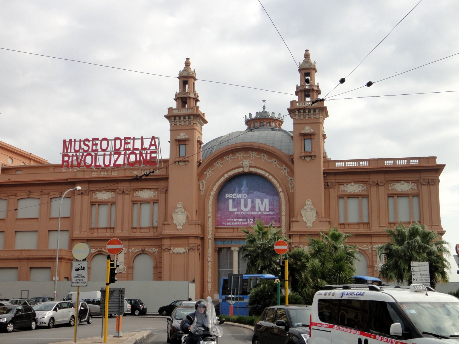 Museum